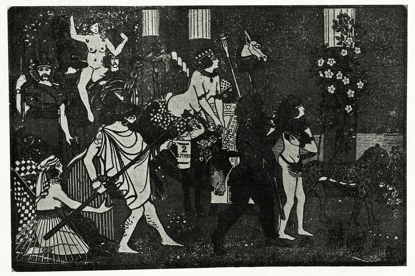 Carte d'invitation au Bal des Quat'z'Arts donné le 15 mai 1907 à la salle Wagram à Paris.